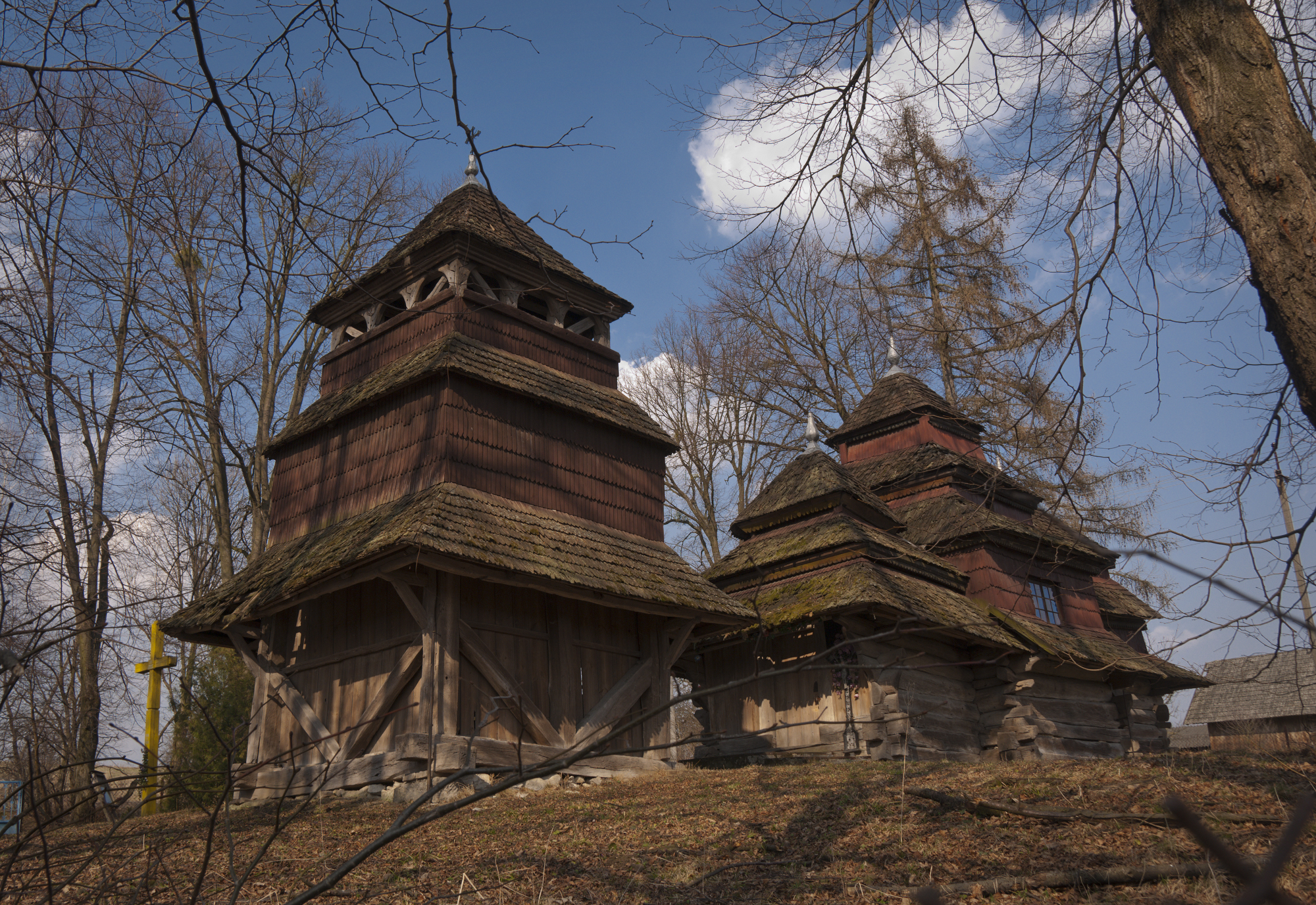 Дерев'яна церква Богоявлення Господнього з дзвіницею (1693 р., XVIII ст.) в селі Кугаїв